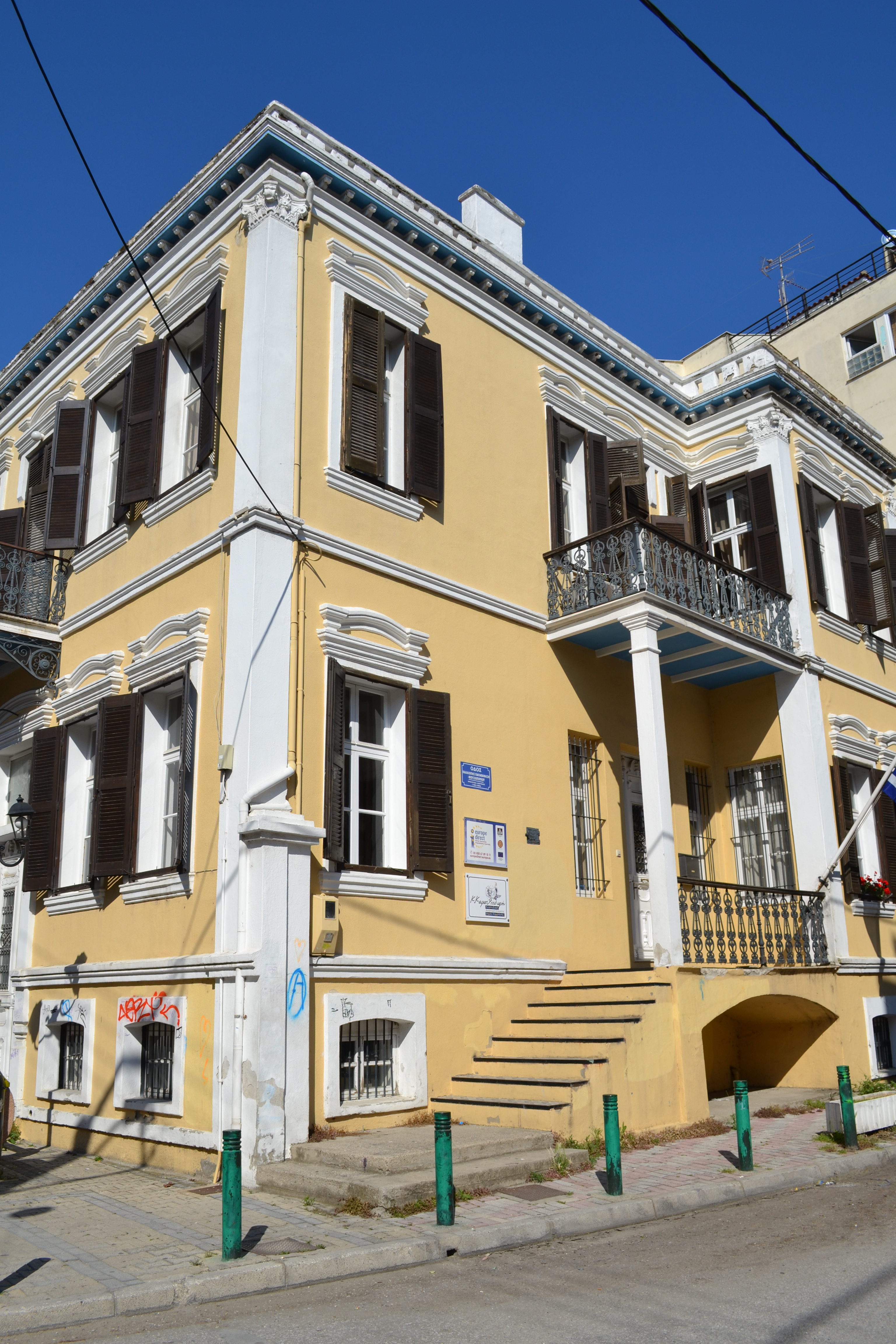 Διώροφο νεοκλασικό επί της Τσανακλή 15, Κομοτηνή«Διώροφο νεοκλασικό επί της Τσανακλή 15»